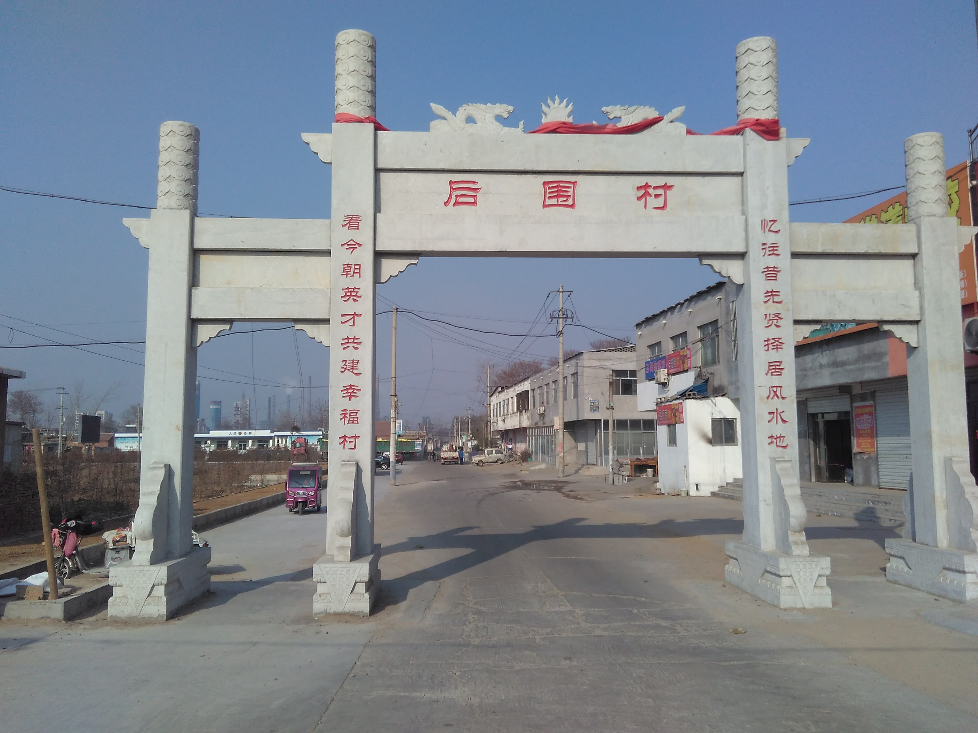 东平县彭集街道后围村